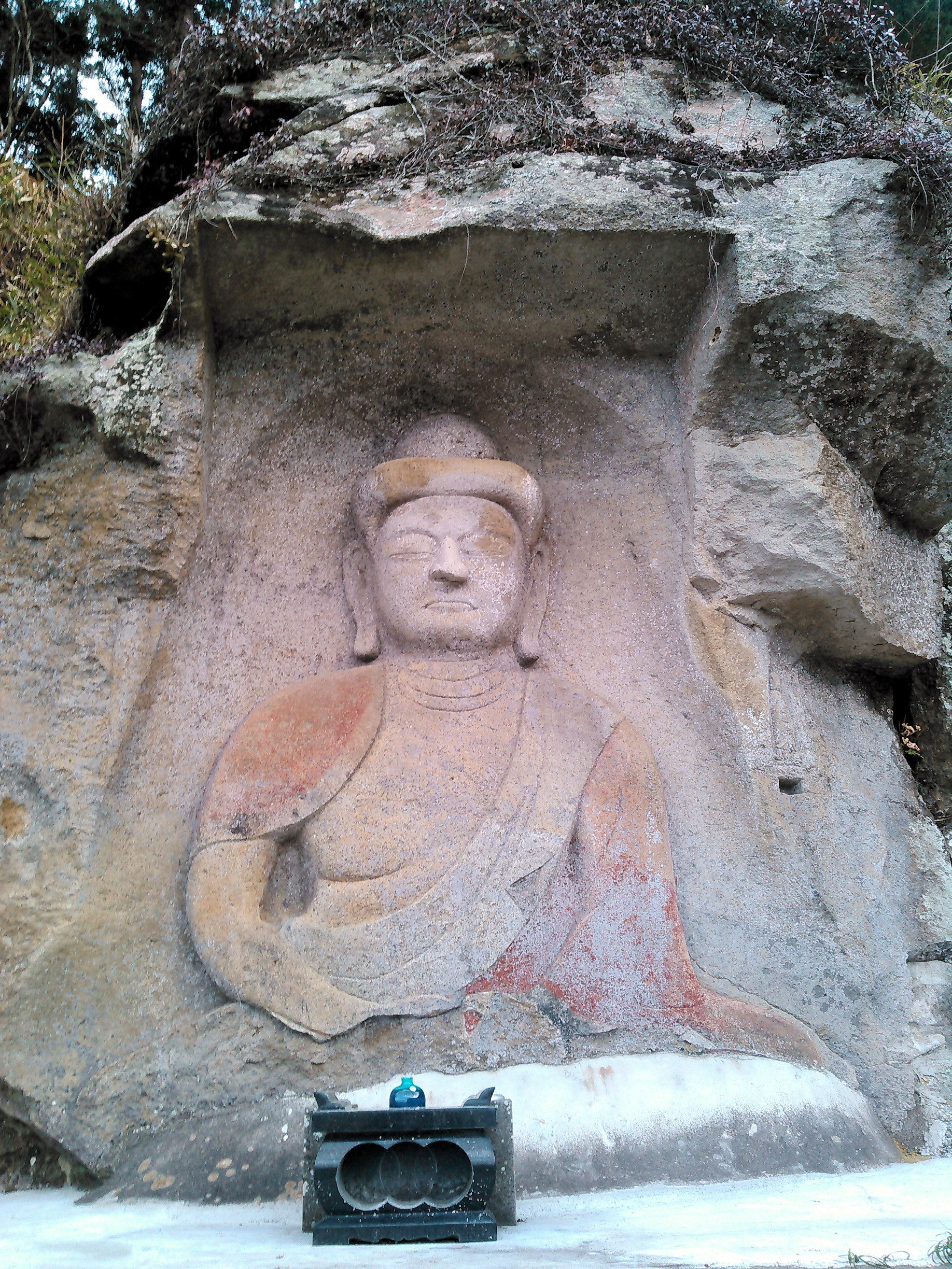 須賀川市の舘ケ岡磨崖仏